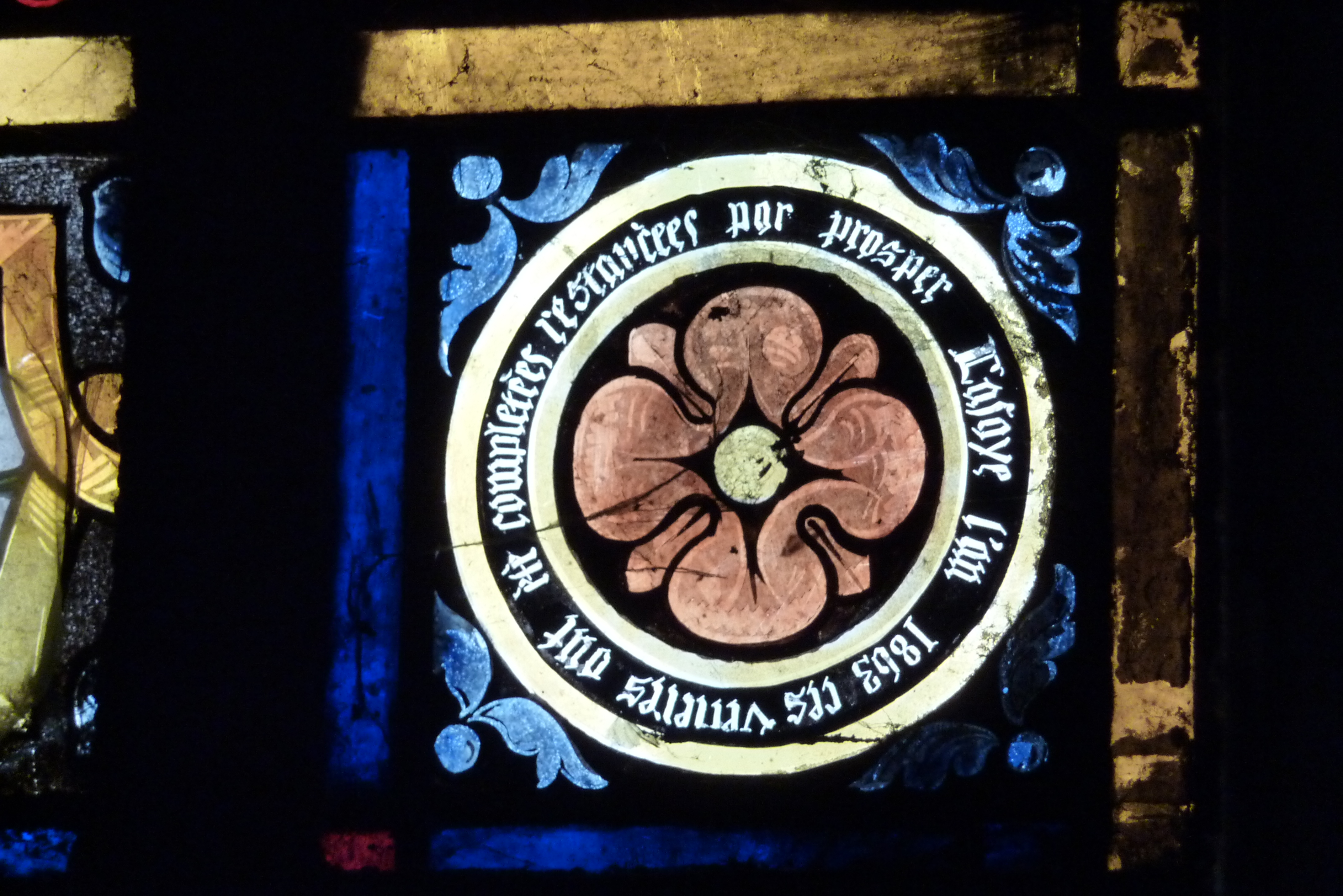 Ausschnitt eines Bleiglasfensters in der katholischen Kirche Saint-Merry in Paris mit der Inschrift: "Ces verrières ont été completées restaurées par Prosper Lafaye l'an 1863"